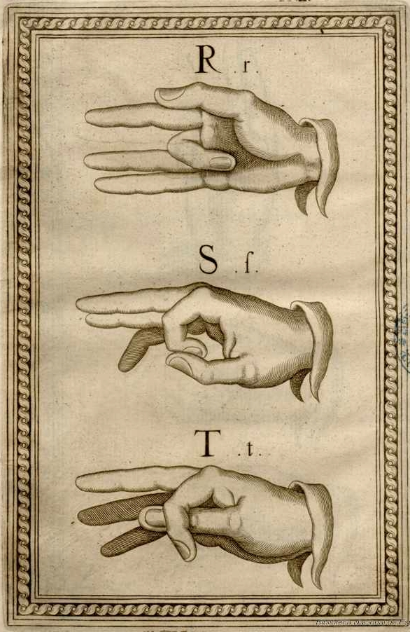 «Abecedario demonstrativo» de Reducción de las letras y arte para enseñar a hablar los mudos, Biblioteca Nacional de España, de Juan Pablo Bonet. 8 Láminas con grabados calcográficos insertos entre las páginas 130 y 131.